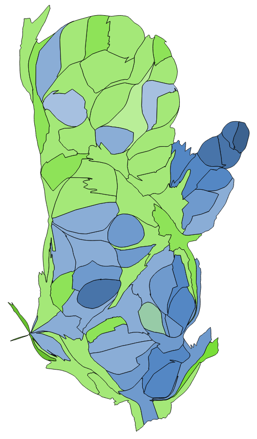 中文（台灣）: 顏色對照表